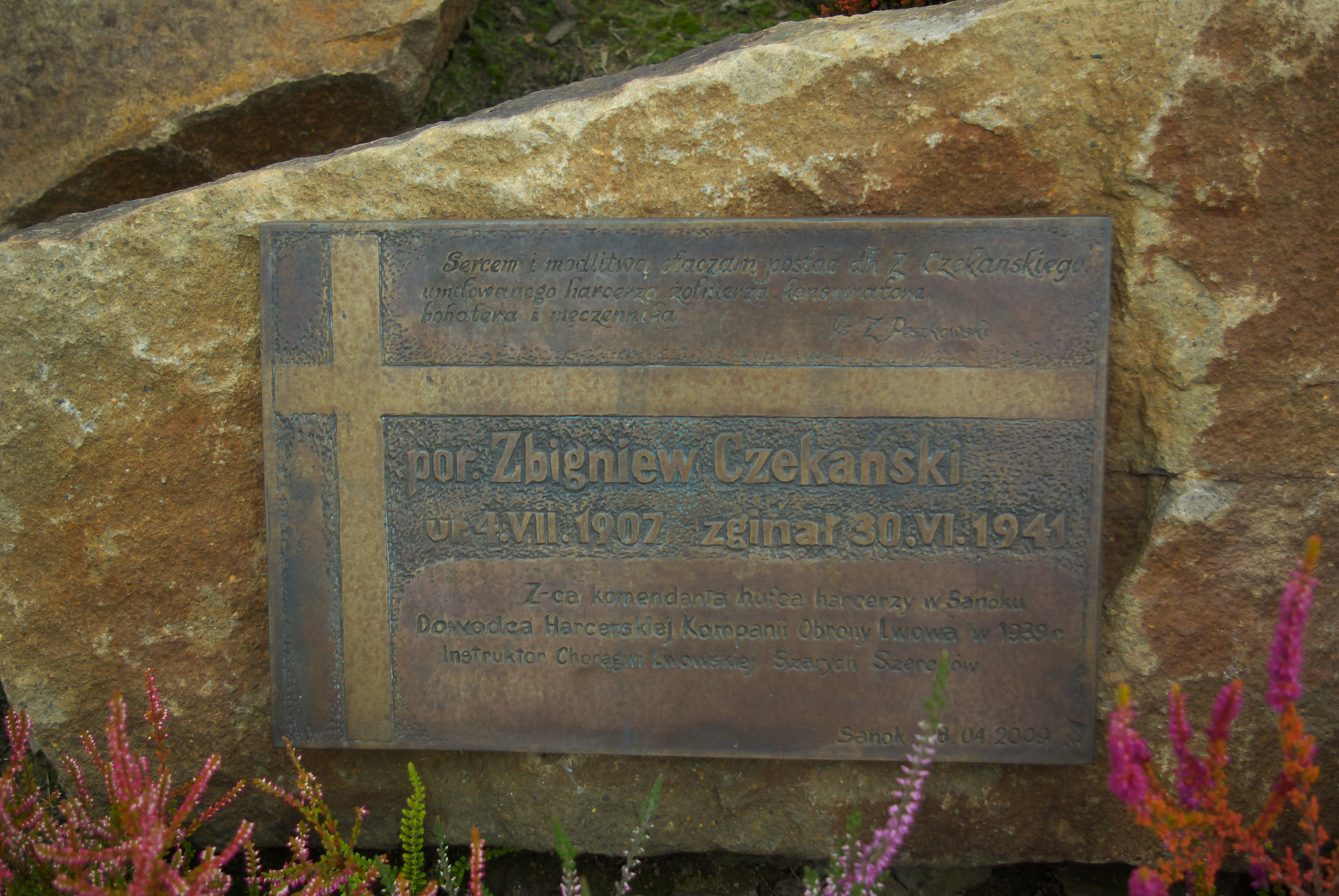 Pomnik Golgota Wschodu na Cmentarzu Centralnym w Sanoku. Kamień poświęcony Zbigniewowi Czekańskiemu